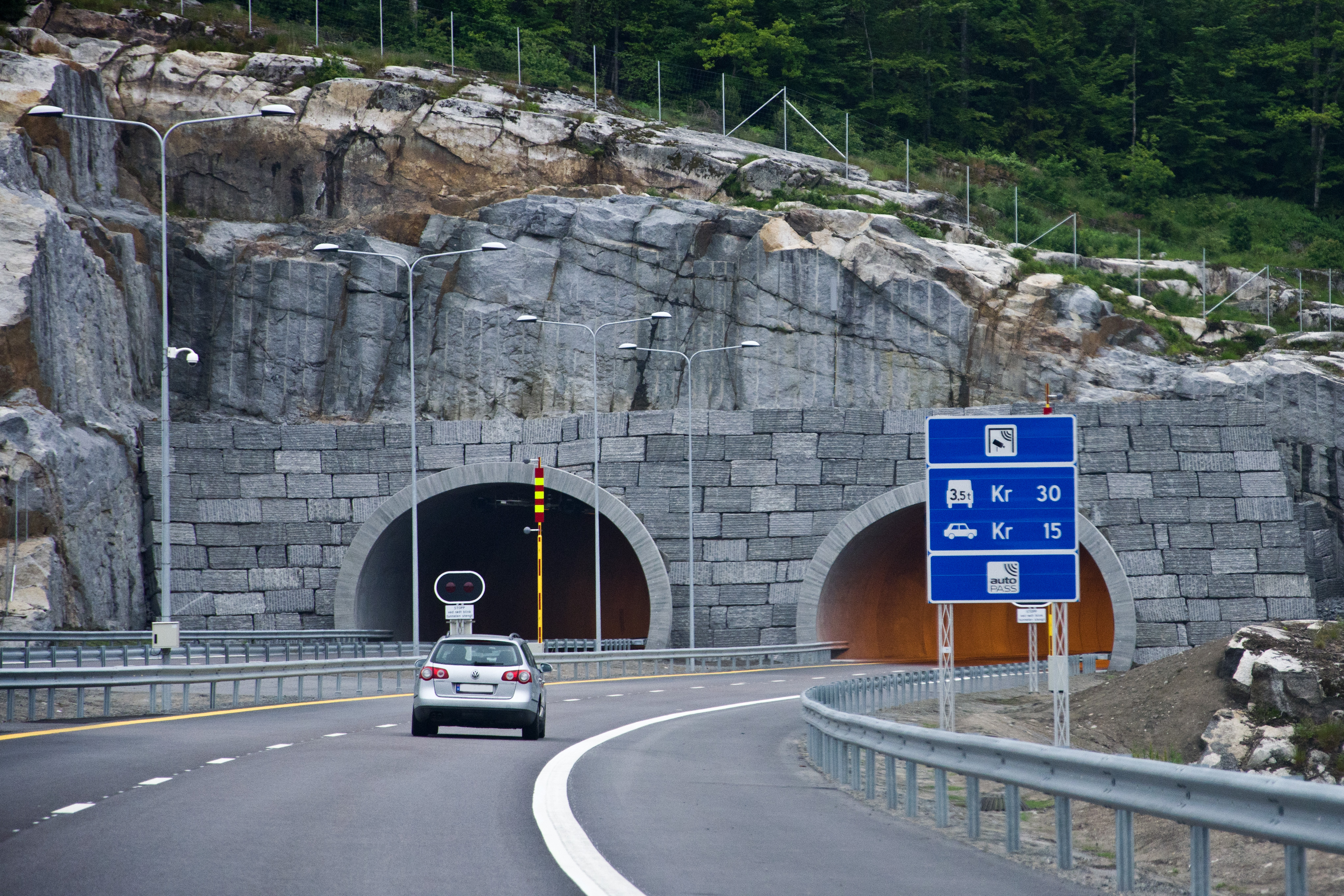 Malerødtunnelen, E18 i Larvik, Vestfold. Sett fra vest.